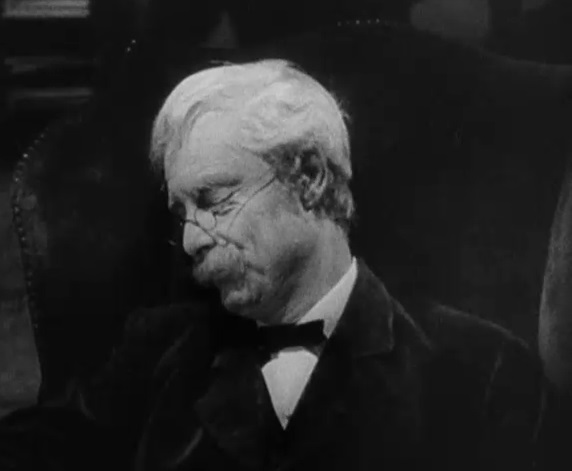 1939年製作の映画『チップス先生さようなら』の予告編動画より。1928年、晩年のチップスを演じるロバート・ドーナット